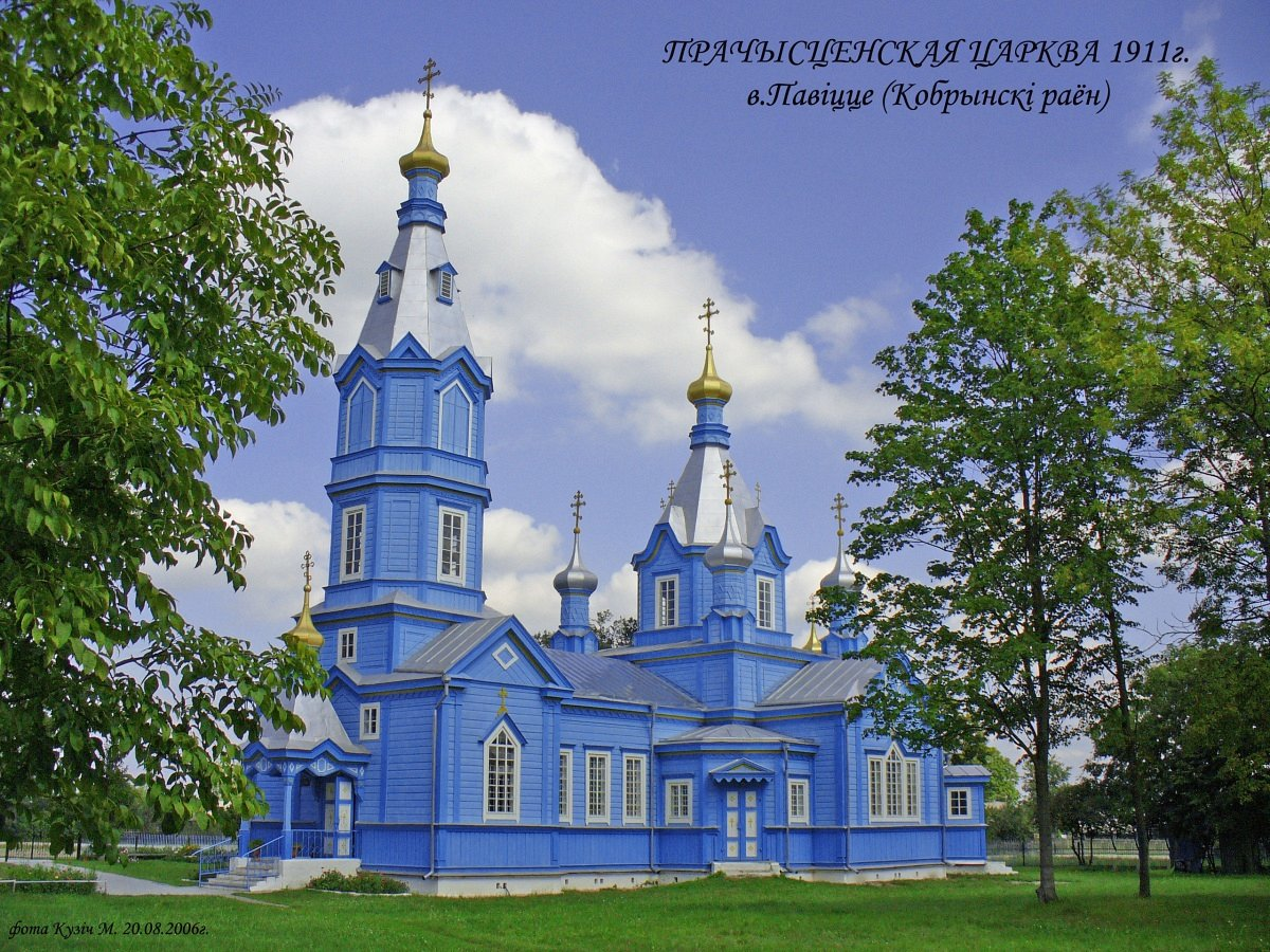 Дзівін. Свята-Прачысценская царква